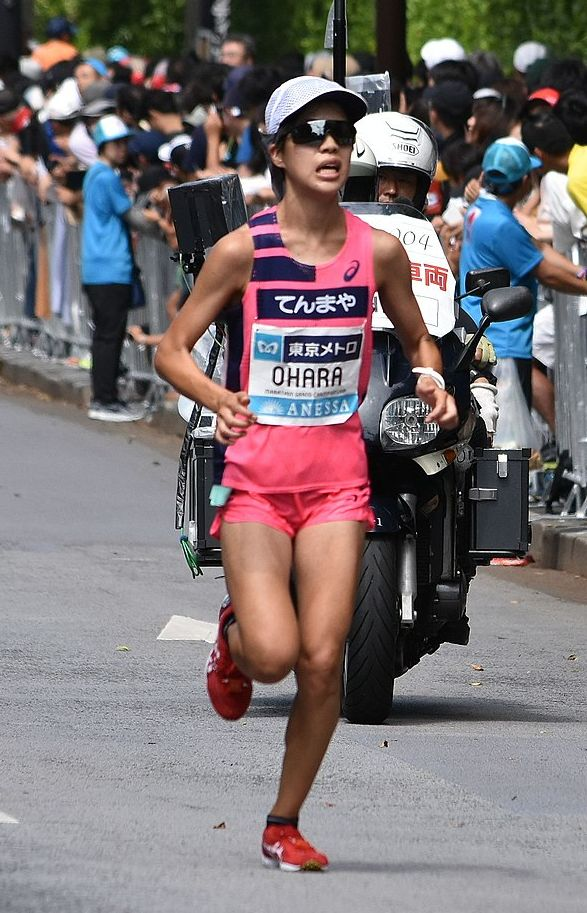 マラソン 小原 怜